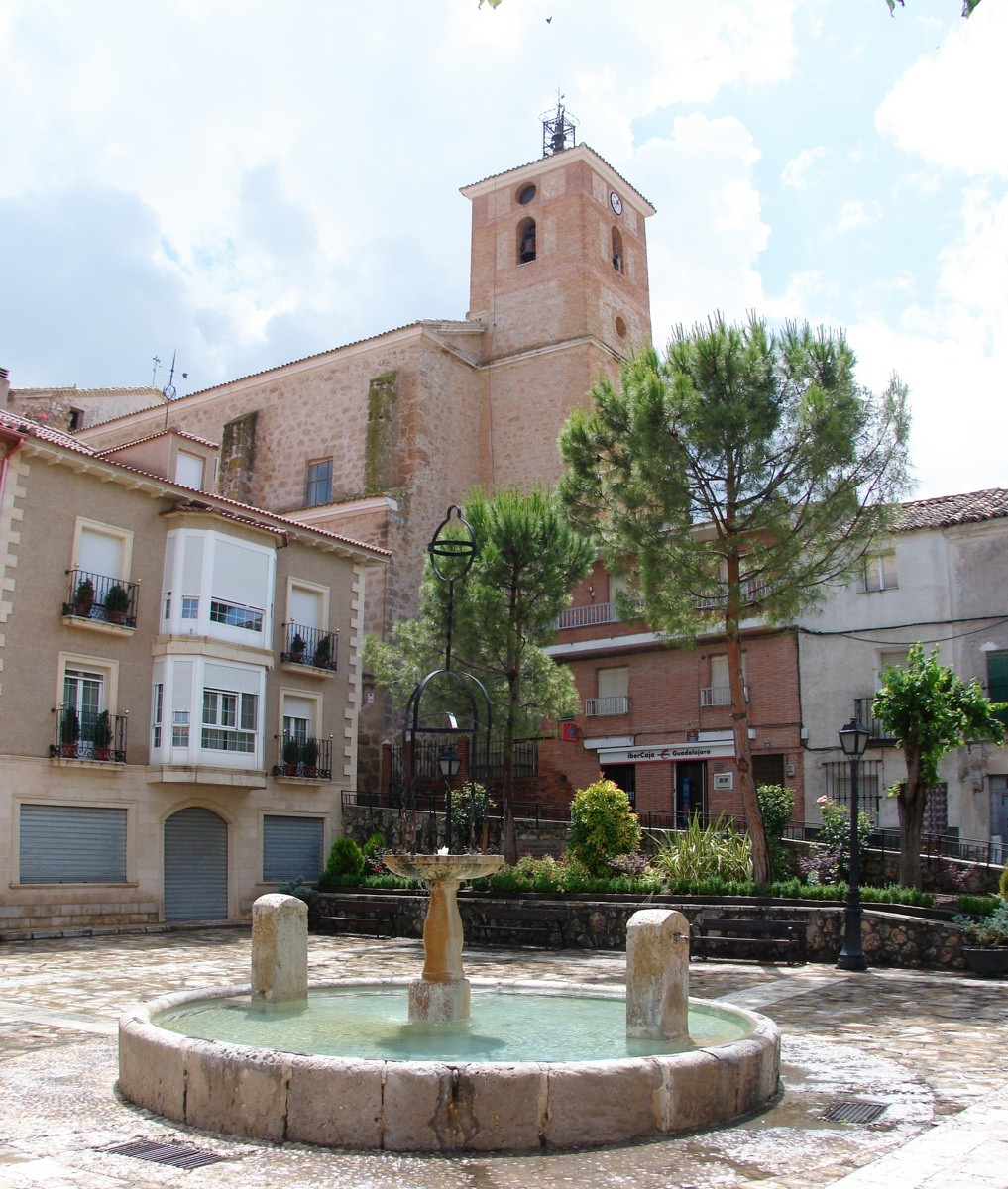 Pilón e iglesia de Nuestra Señora de la Asunción (Illana - Guadalajara)